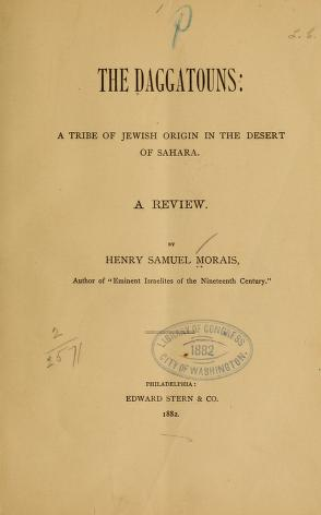 Page de titre du livre de Henry Samuel Morais, The Daggatouns, Philadelphie, 1882.